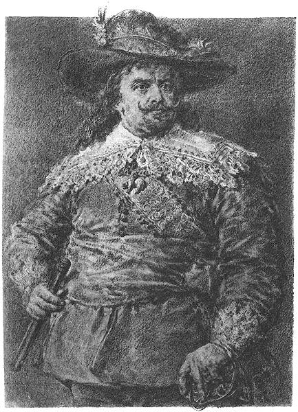 Władysław IV Waza, pencil drawing